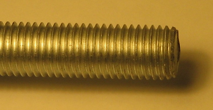 Kuniga metreca ekstera ŝraŭbeco M16 Mi, aŭtoro de la bildo, permesas al ĉiuj uzi ĝin kun ĉi tiaj kondiĉoj